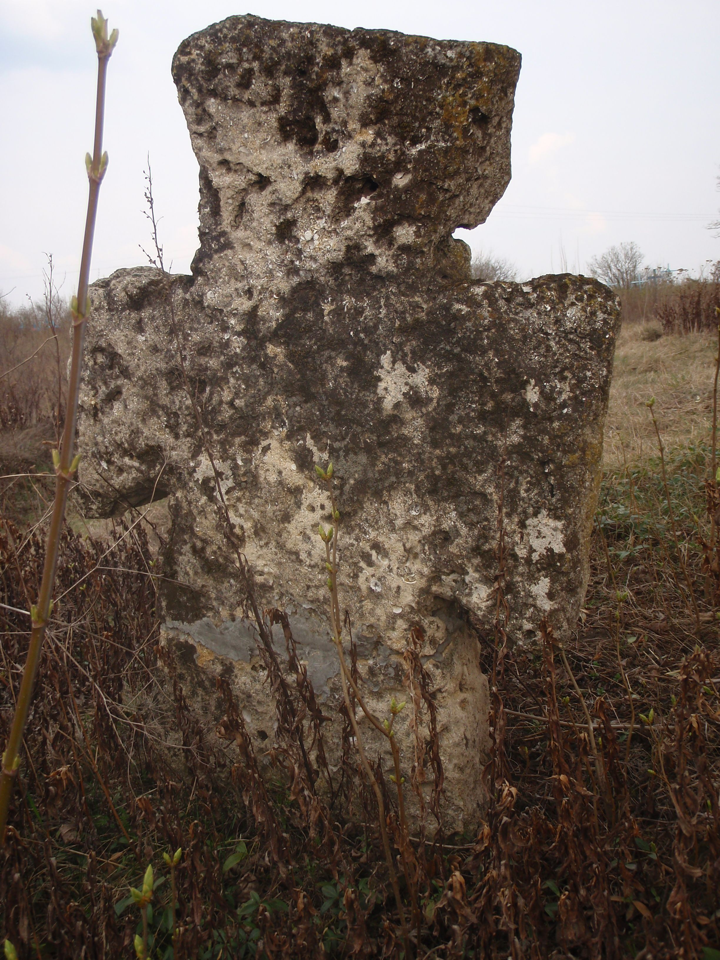 Козацький хрест в с. Великі Каленичі